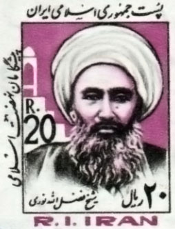 Sheikh Fazlollah stamp